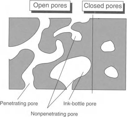 انواع تخلخل در یک ماده